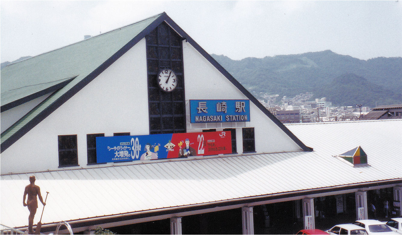 JR九州長崎駅（3代目駅舎）